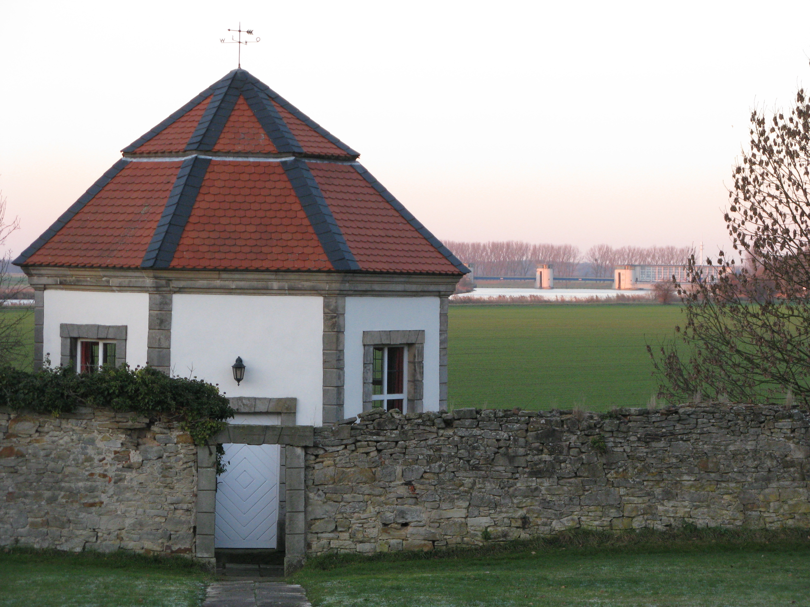 Pavillon mit Weser und Staustufe Schlüsselburg